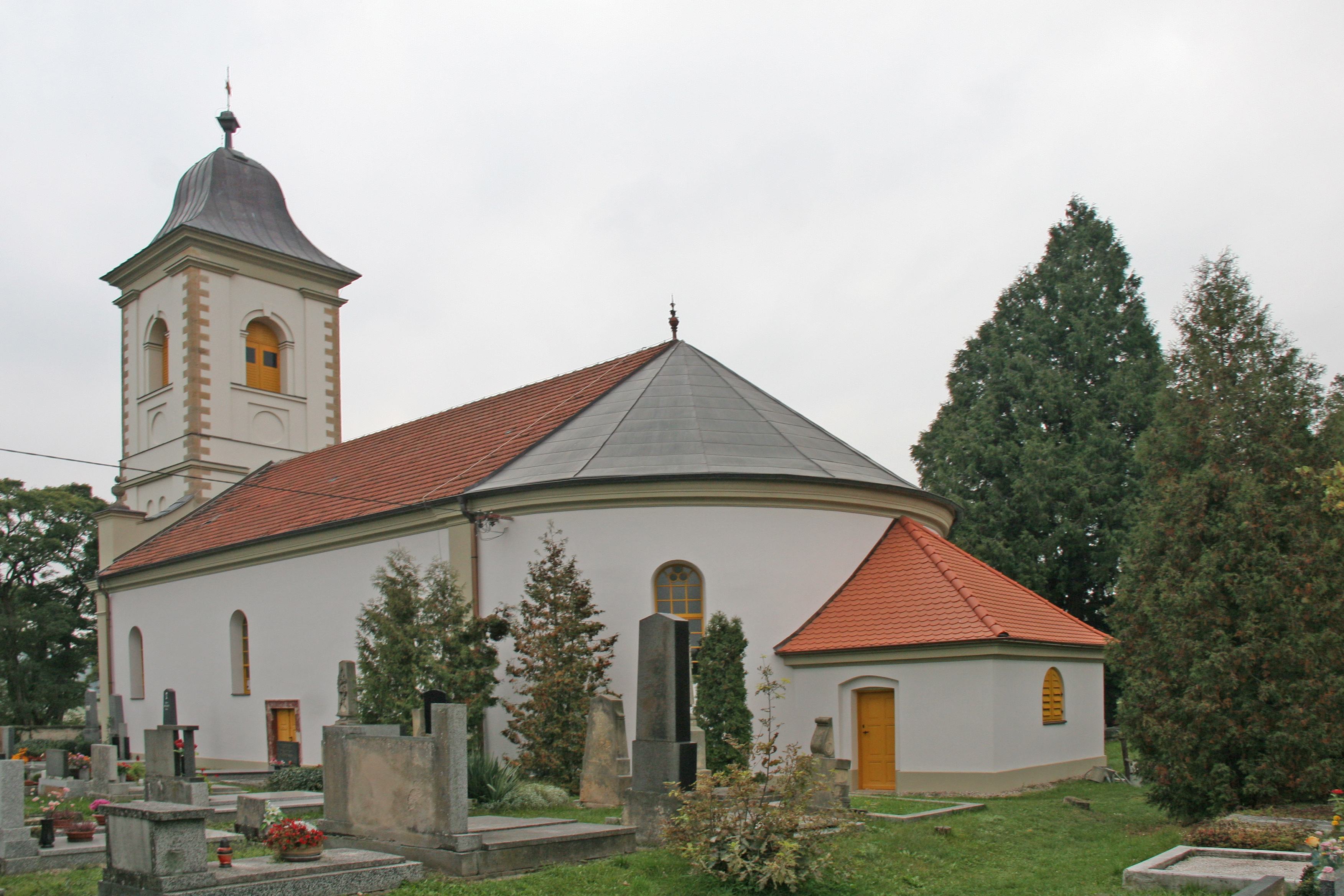 Kostel Českobratrské církve evangelické, při cestě do Městce, Klášter nad Dědinou.